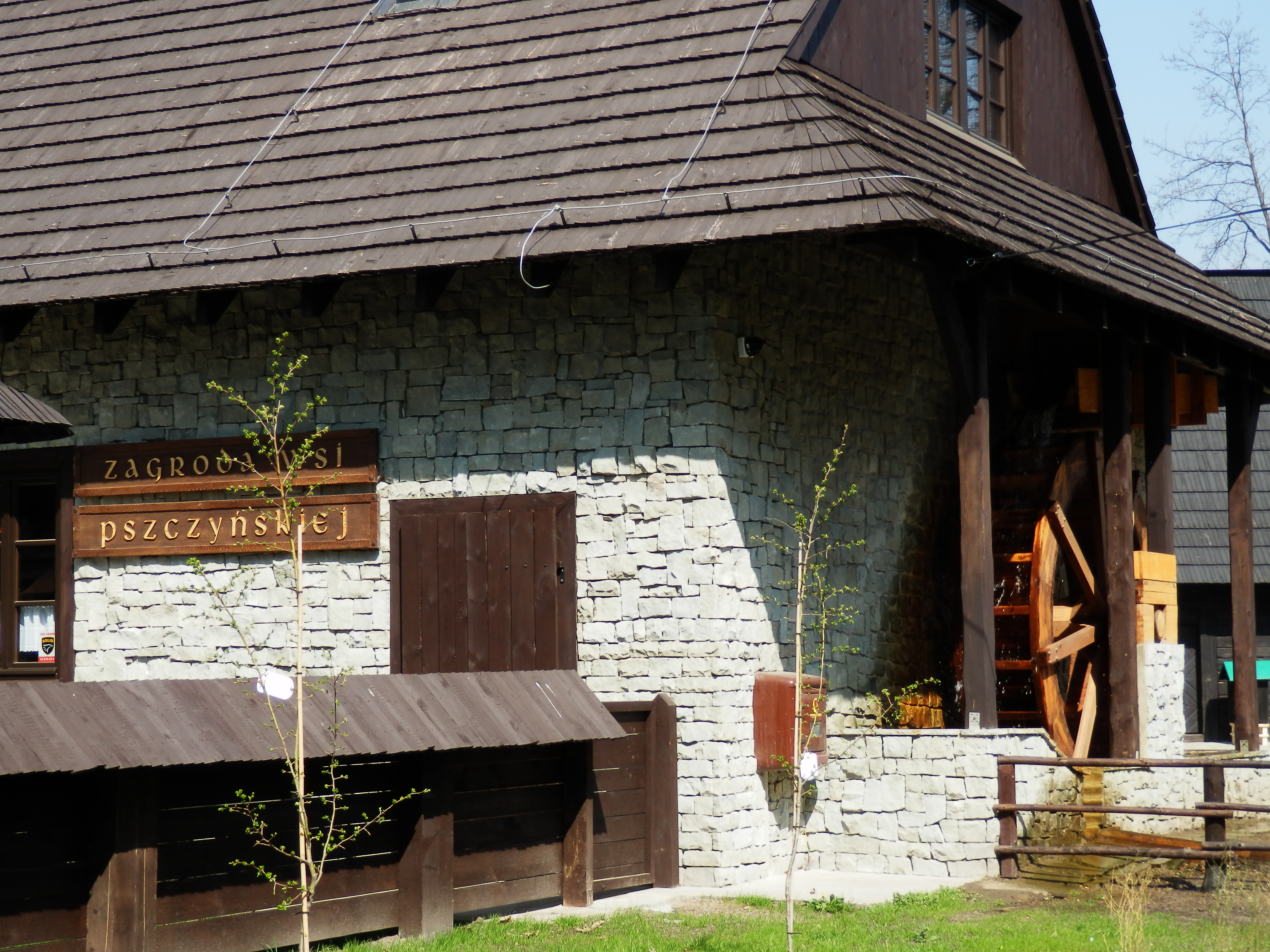 Pszczyna, zespół obiektów drewnianych w Skansenie – Zagroda Wsi Pszczyńskiej